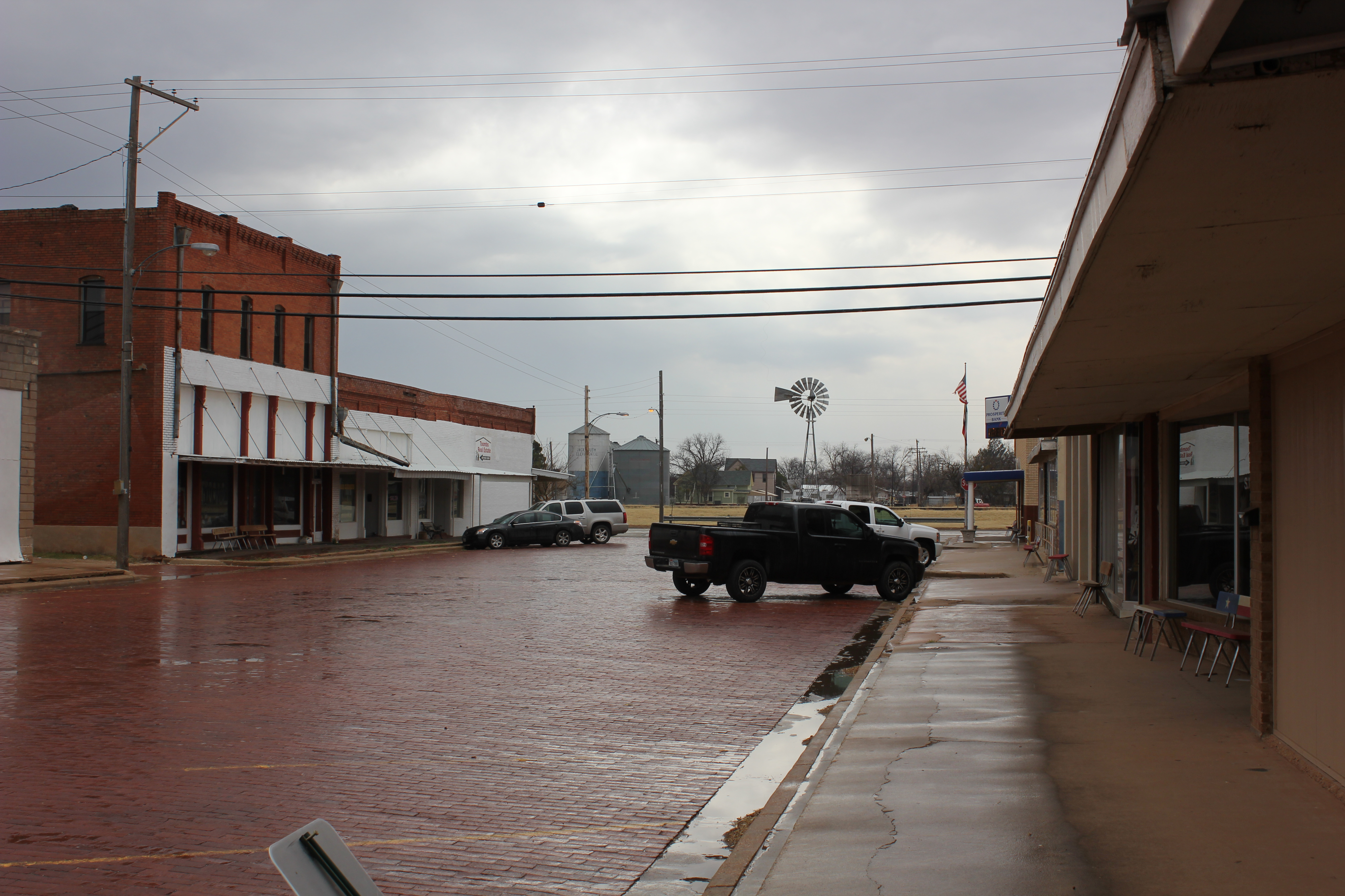 Merkel Street